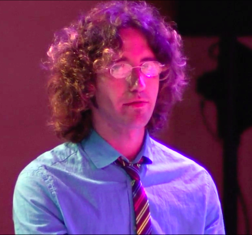 Tenora 2.0. Fòrum IMPULSA 2012. Teclat, piano i producció de directe amb manipulació de bases rítmiques: Xavi Lloses.